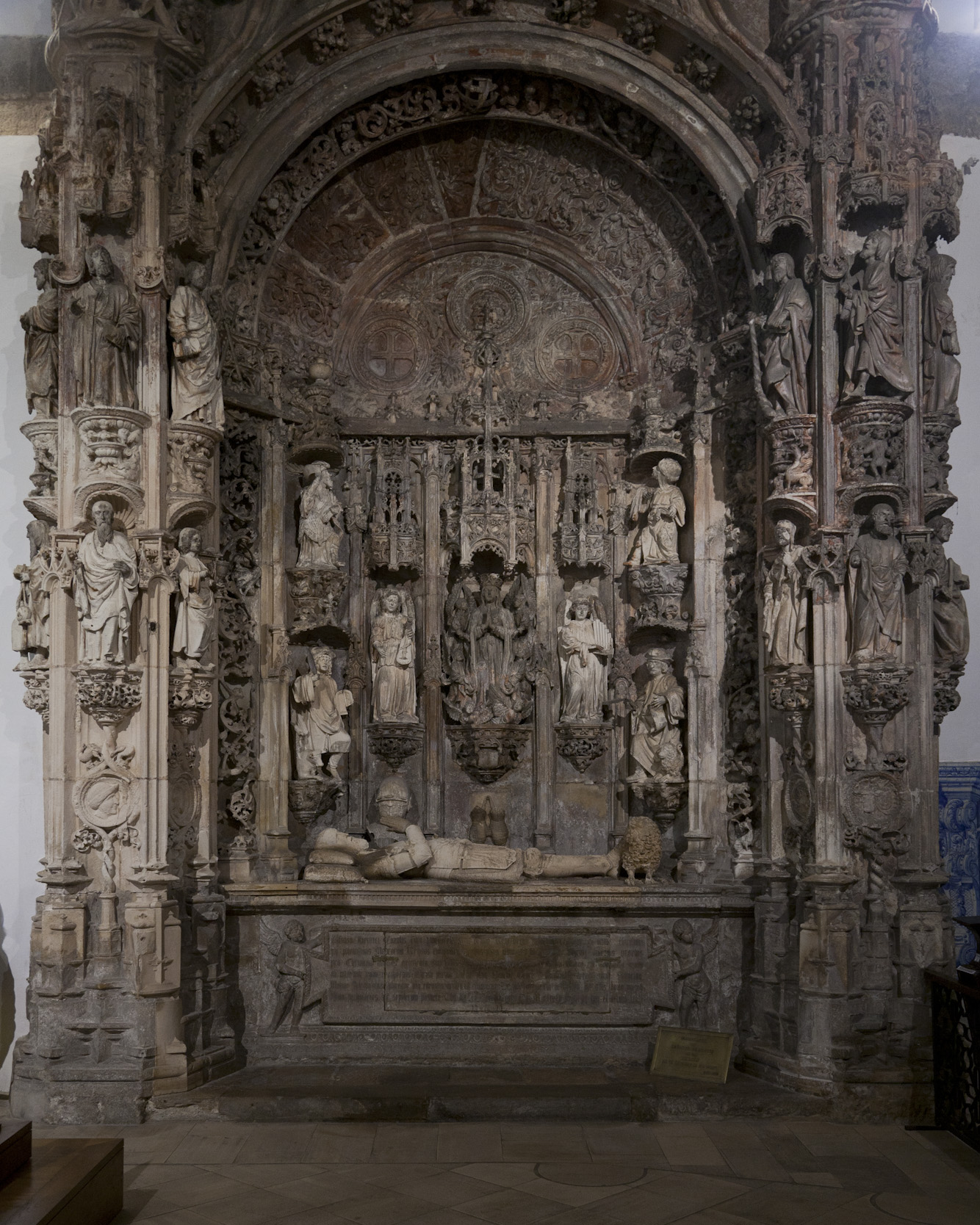 Túmulo de D. Afonso Henriques (Diogo de Castilho ou João de Castilho: conceção global; Nicolau Chanterene: estátua jacente; outra estatuária: Mestre dos Túmulos Reais) Igreja do Mosteiro de Santa Cruz, Porto